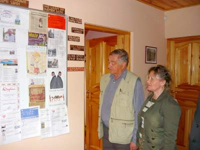 Tadeusz Morawski i Janina Wielogurska w Muzeum Palindromów, Nowa Wieś koło Serocka